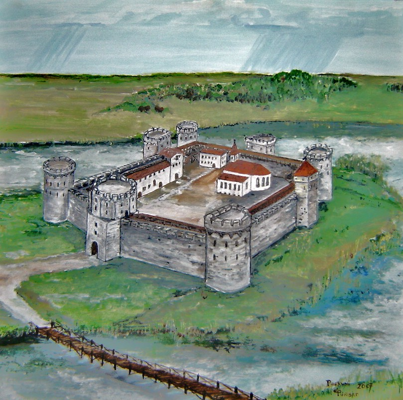 Selline võis olla Porkuni linnus. Ise maalitud ja pildistatud 2007